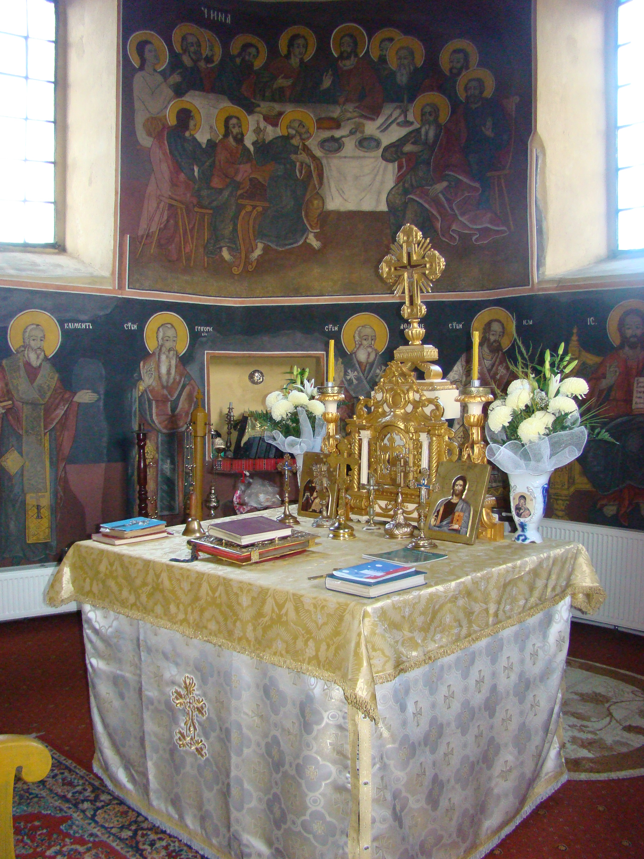 Biserica „Naşterea Născătoarei de Dumnezeu" din Hălmagiu, județul Arad